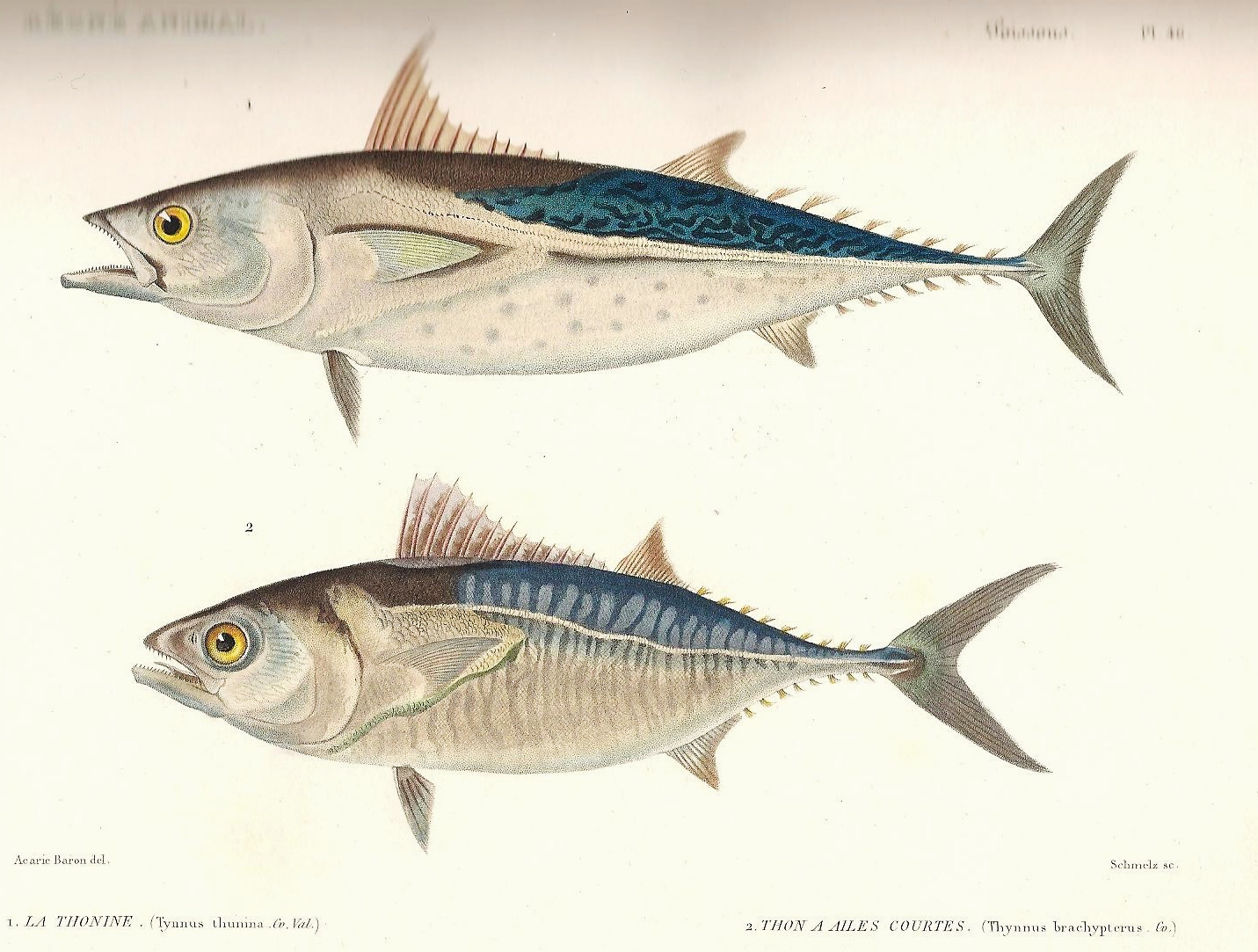 Planche N°46 du livre "Le règne animal distribué d'après son organisation" par Georges Cuvier (Tome 8), seconde édition de 1828, représentant : -en haut : Euthynnus alletteratus syn. Thynnus thunnina -en bas : Sarda sarda syn. Thynnus brachypterus